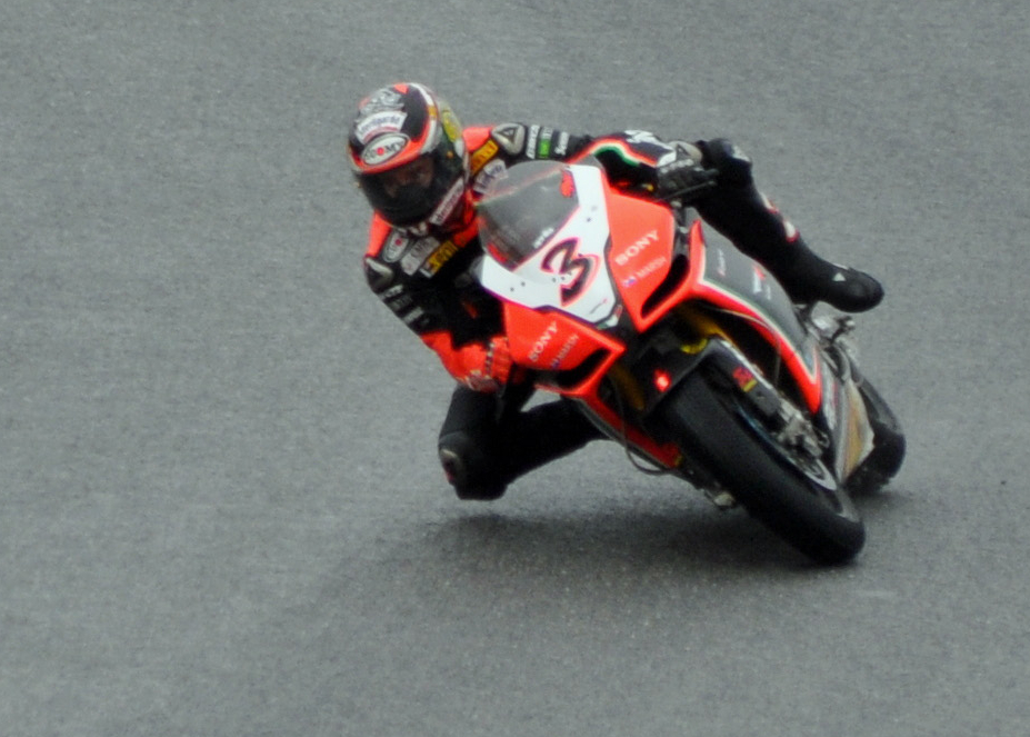 Autódromo Internacional do Algarve (2012-09-23), by Klugschnacker in Wikipedia (36) Max Biaggi (ITA) auf Aprilia